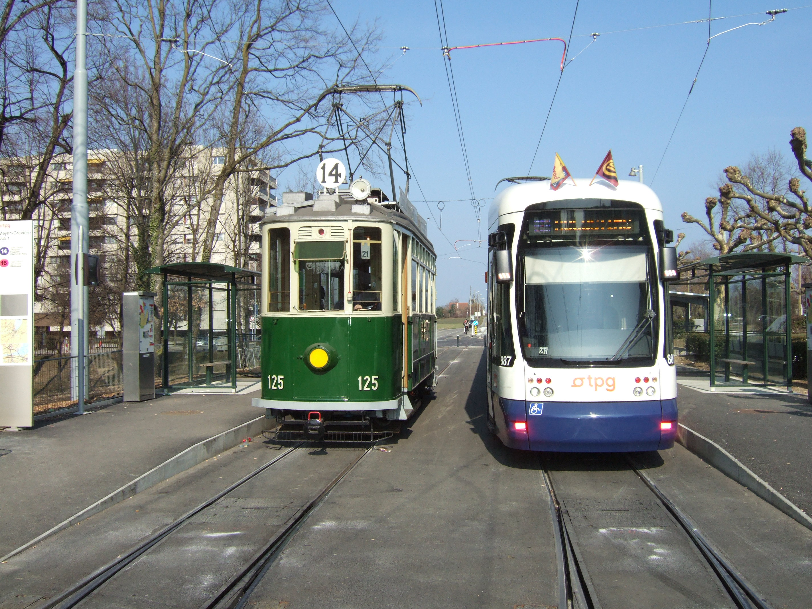 Photo: Trams aux Fils. Terminus de Meyrin Gravières